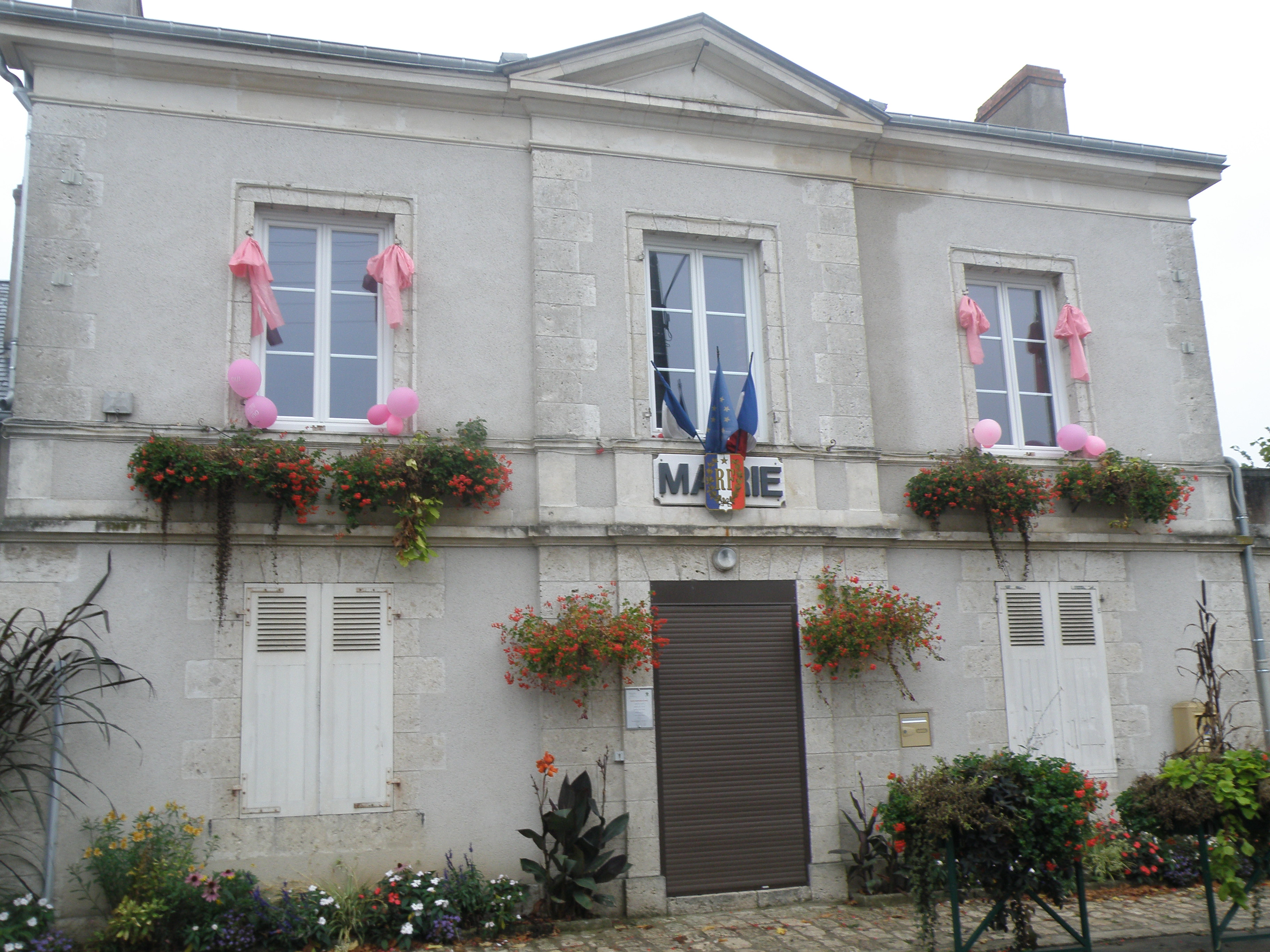 Représentation de la mairie de Villorceau.